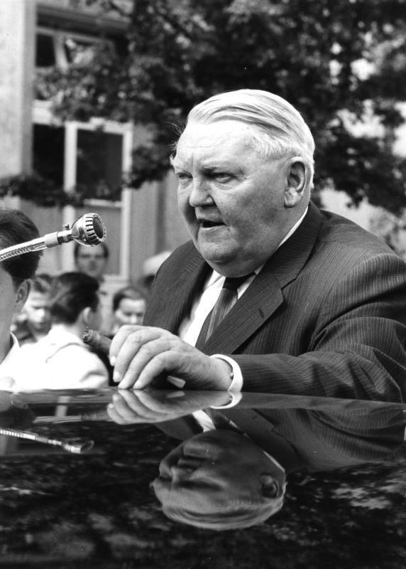 11.6.1966 Wahlreise des Bundeskanzlers Prof. Ludwig Erhard in Nordrhein-Westfalen